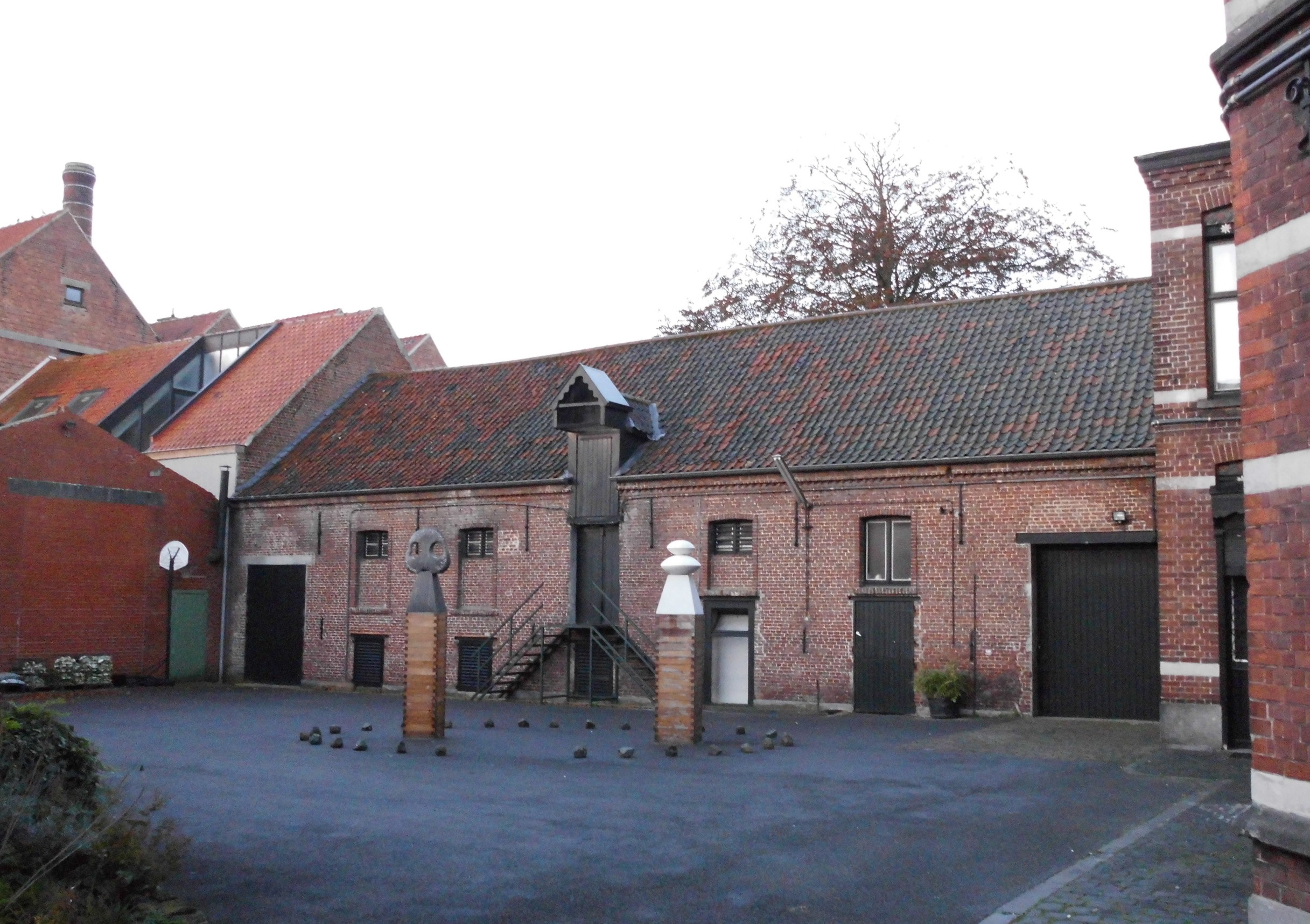 Brouwerij Van den Bussche - Marktplein - Ardooie - West-Vlaanderen - België